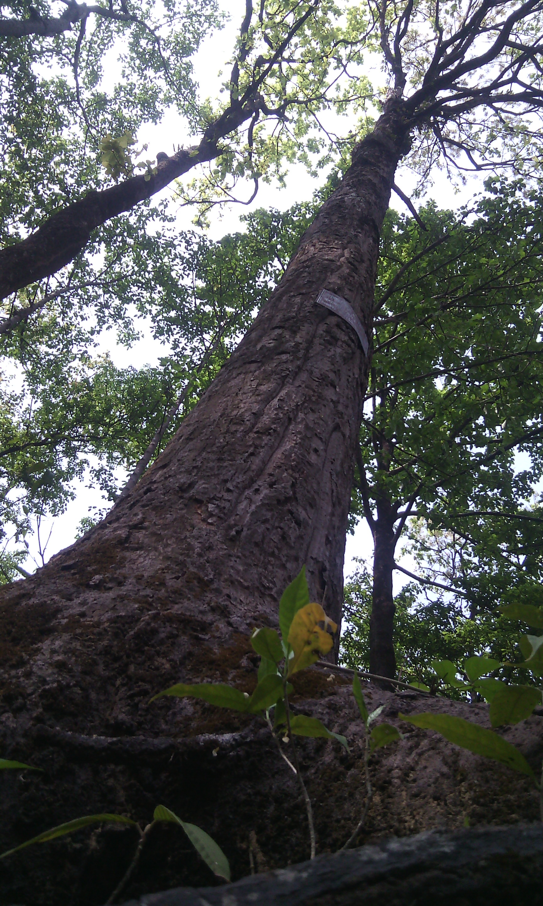 টিলাগড় ইকোপার্ক